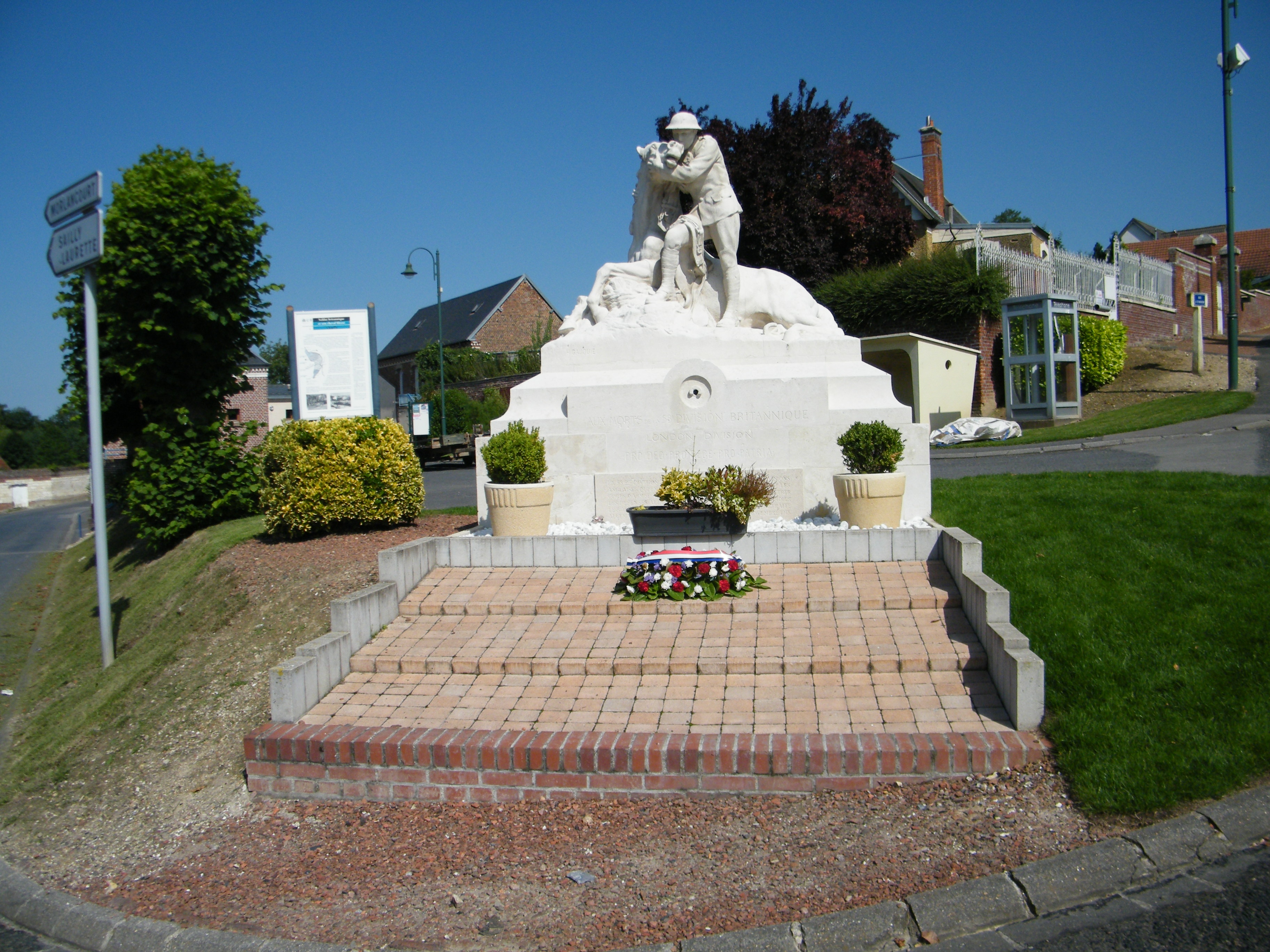 Monument à la 58è division britannique, Guerre 1914-1918, cheval blessé.